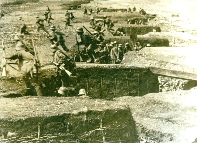 Снимка на атакуващ австро-унгарски пехотен батальон от битката при р. Изонцо през Първата световна война.